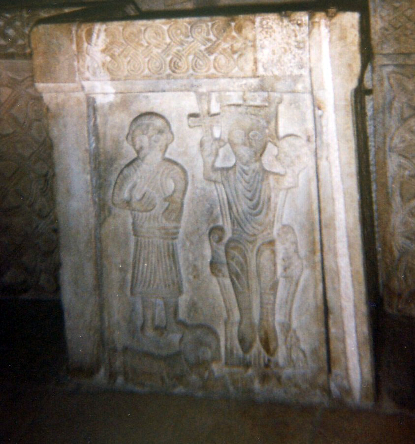 Reljef hrvatskog srednjevijekovnog vladara na krstionici u Splitskoj katedrali